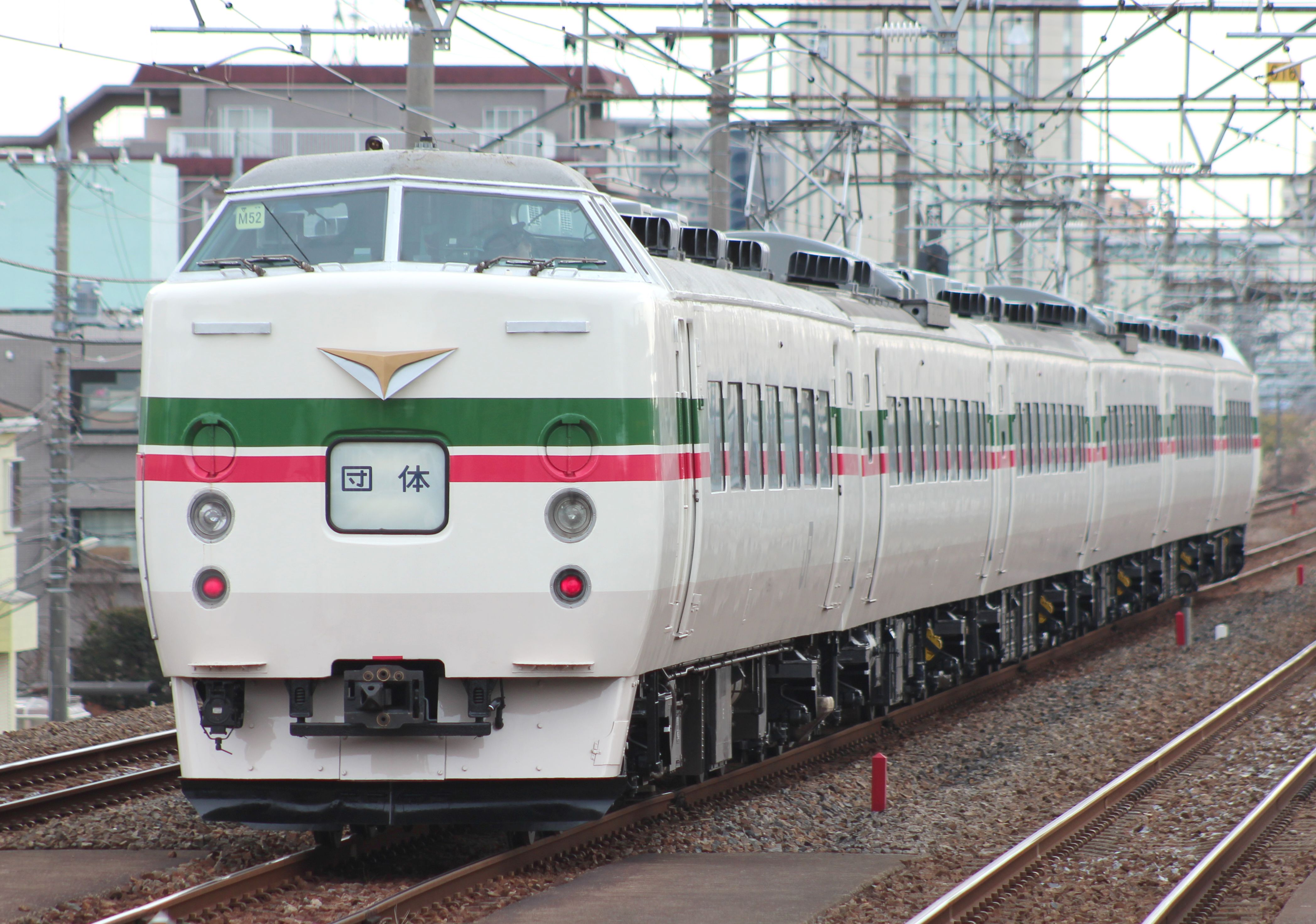 JR東日本 189系 M52編成 グレードアップ「あずさ」塗装